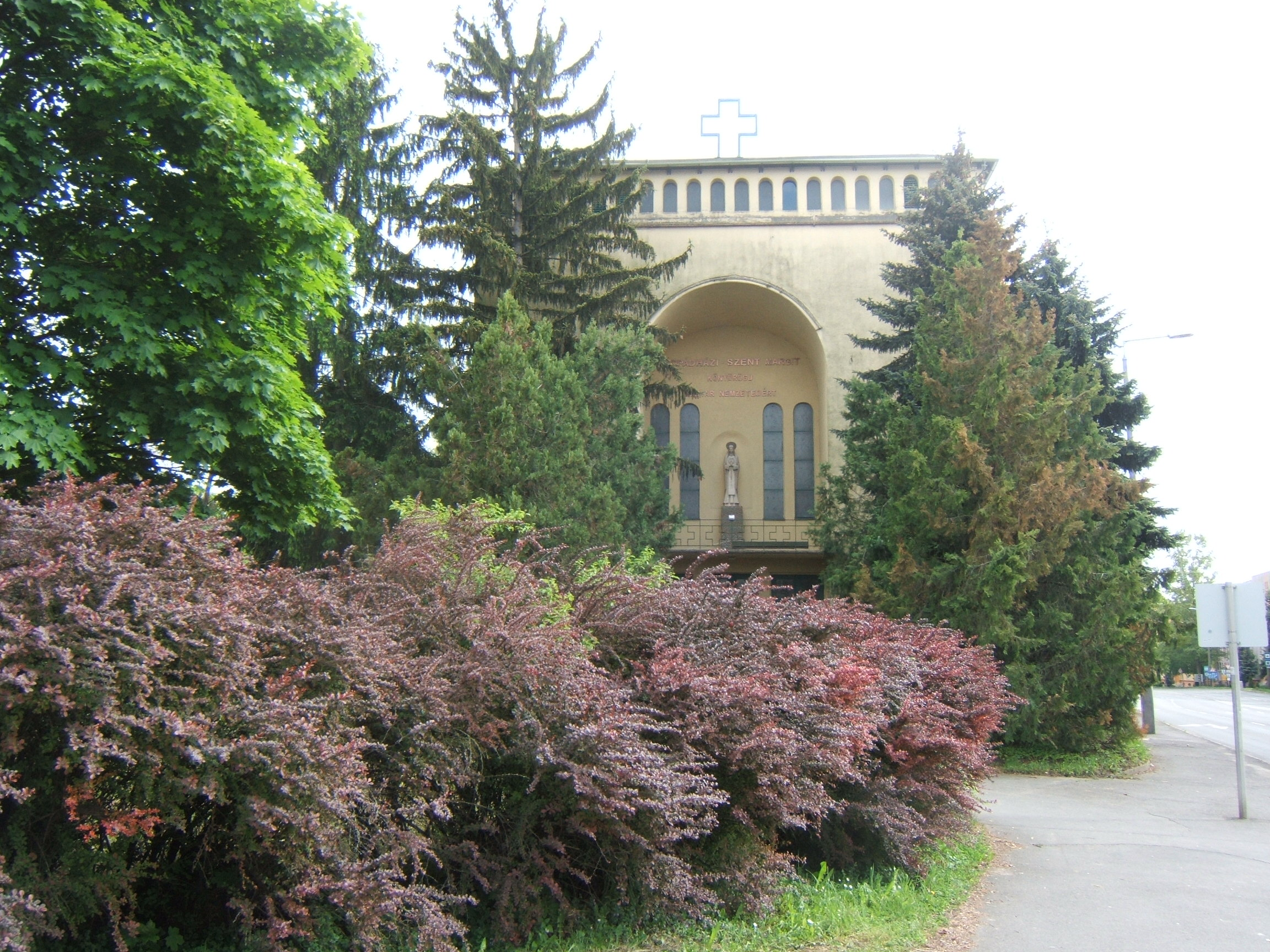 Kaposvár, Szent Margit-templom